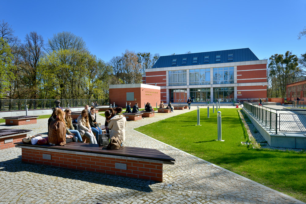 Budynek Nanotechnologii A Politechniki Gdańskiej (Wydział Fizyki Technicznej i Matematyki Stosowanej).